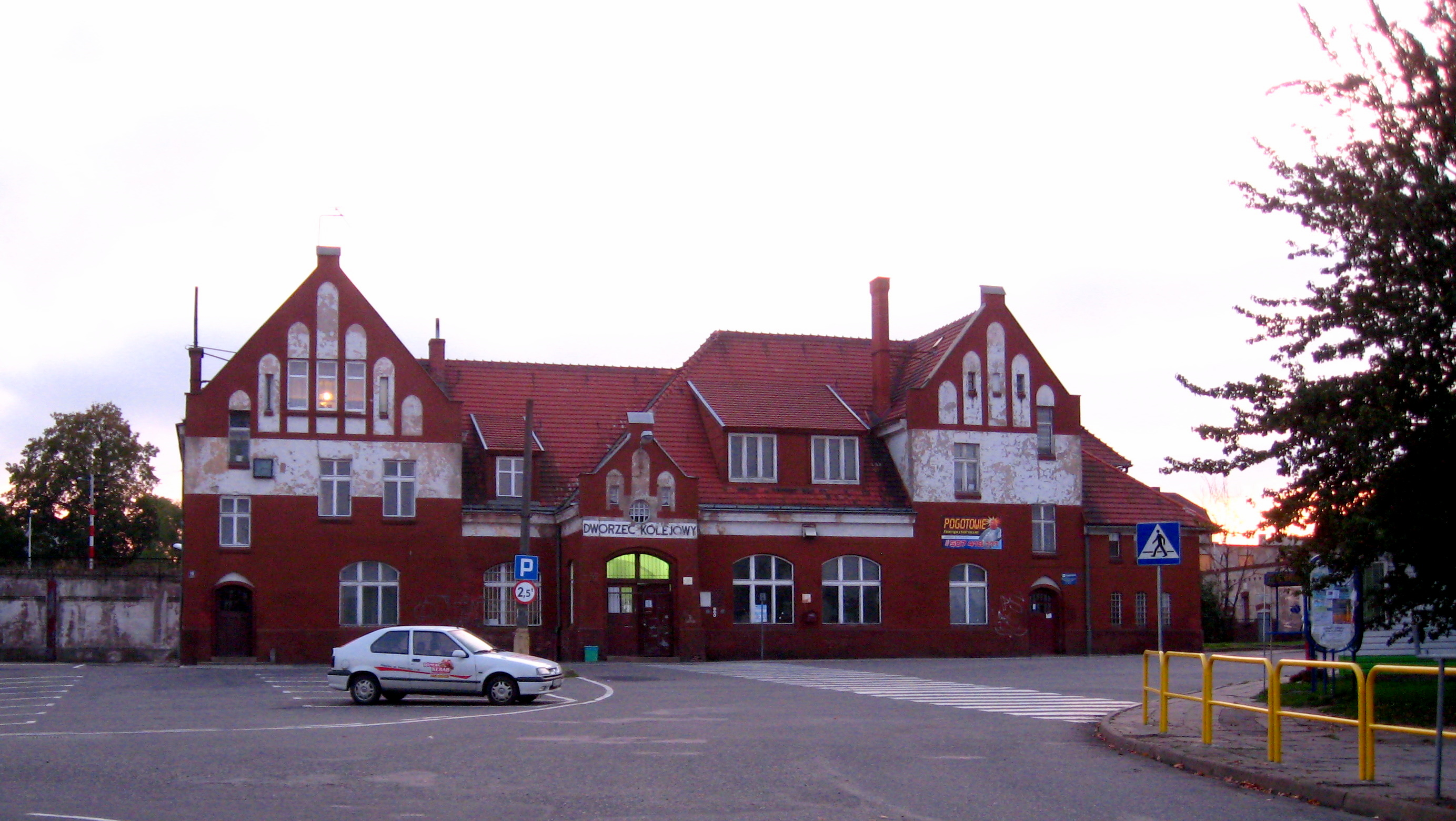 dworzec kolejowy w Miastku